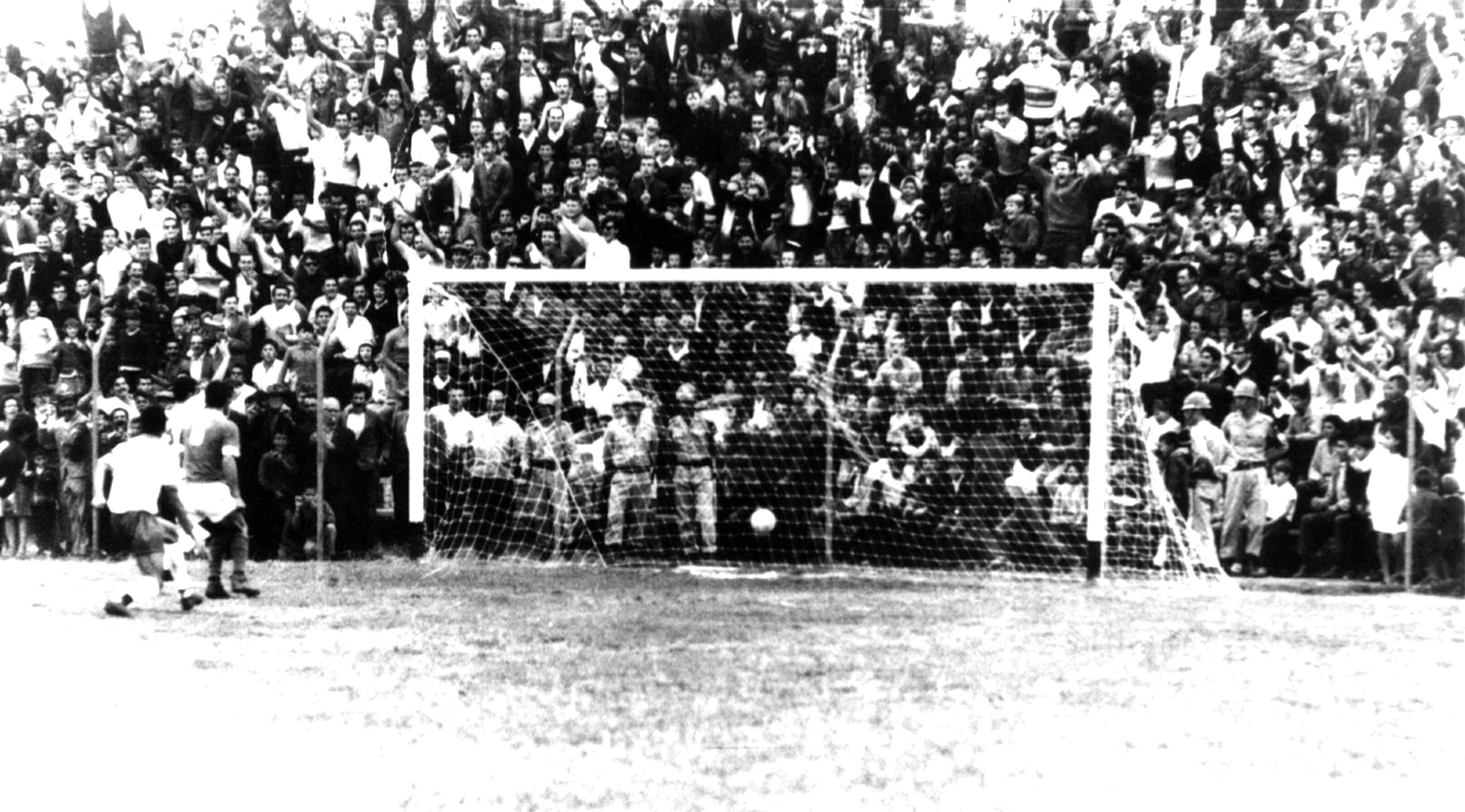 A torcida vibra com o gol de Bebeto contra o Riograndense de Rio Grande em 1967